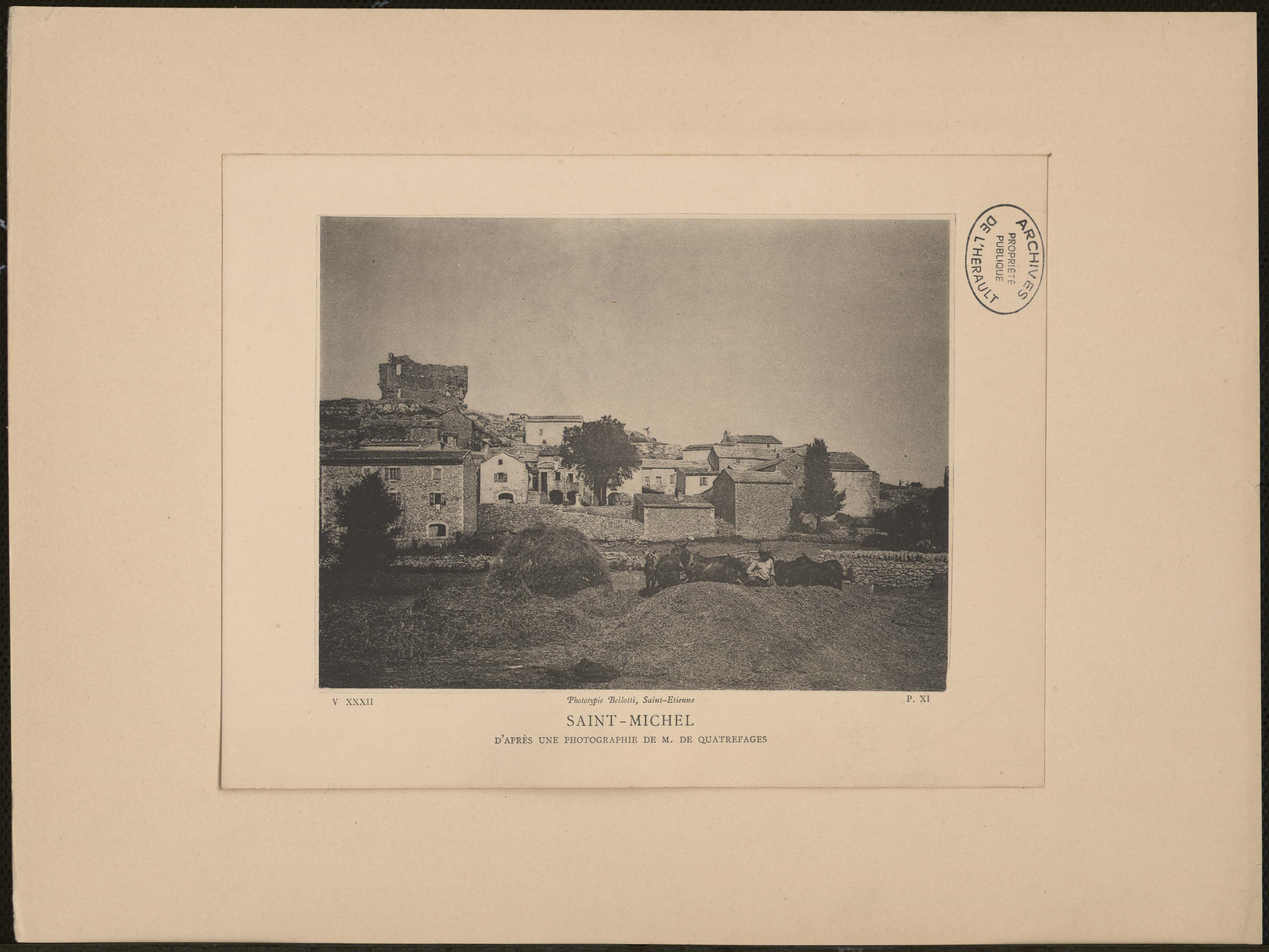 Saint-Michel. - Vue générale : phototypie tirée de "Histoire des communes de l'Hérault" par Albert Fabre.